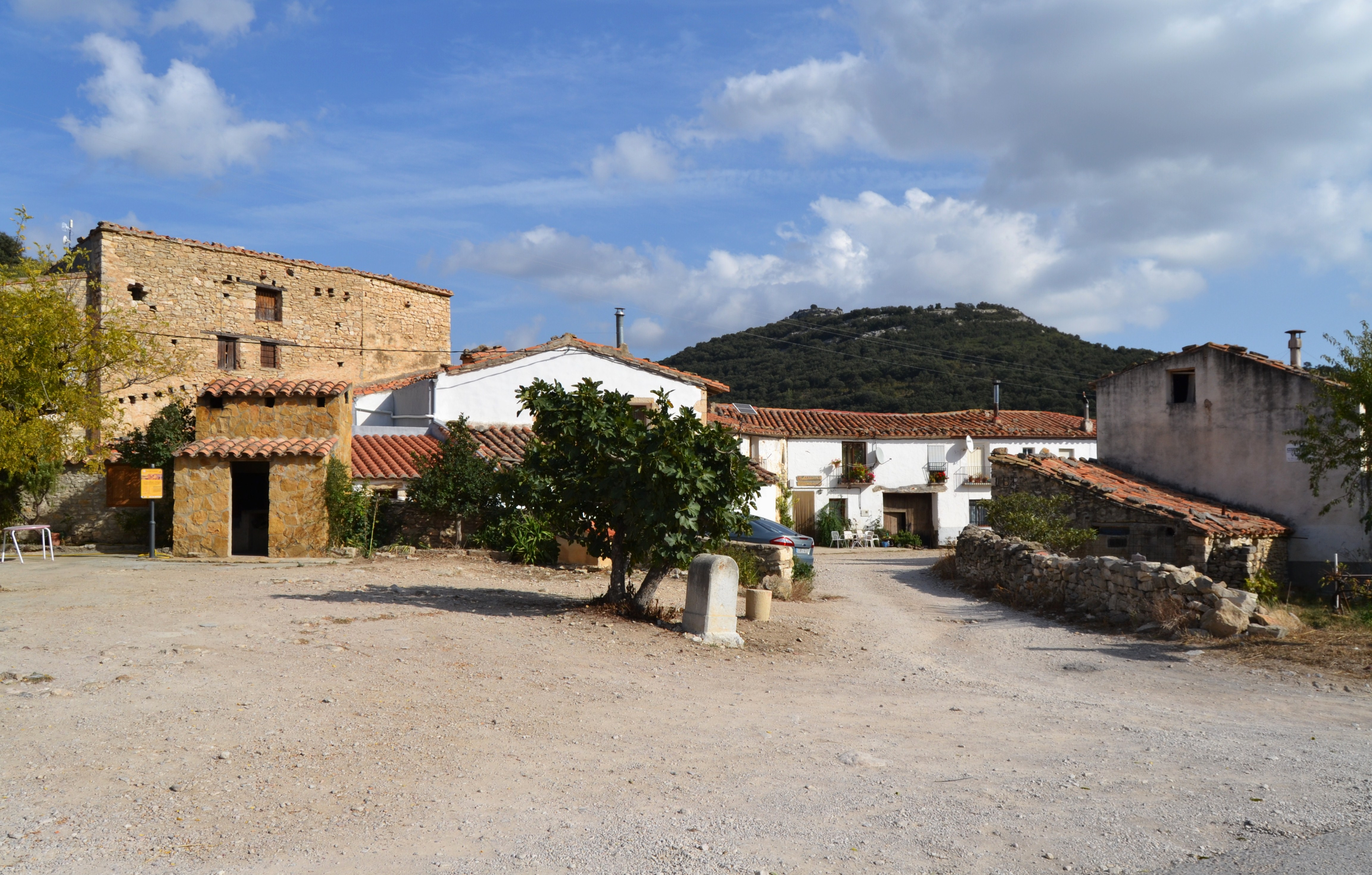 Vista de la Montalbana.